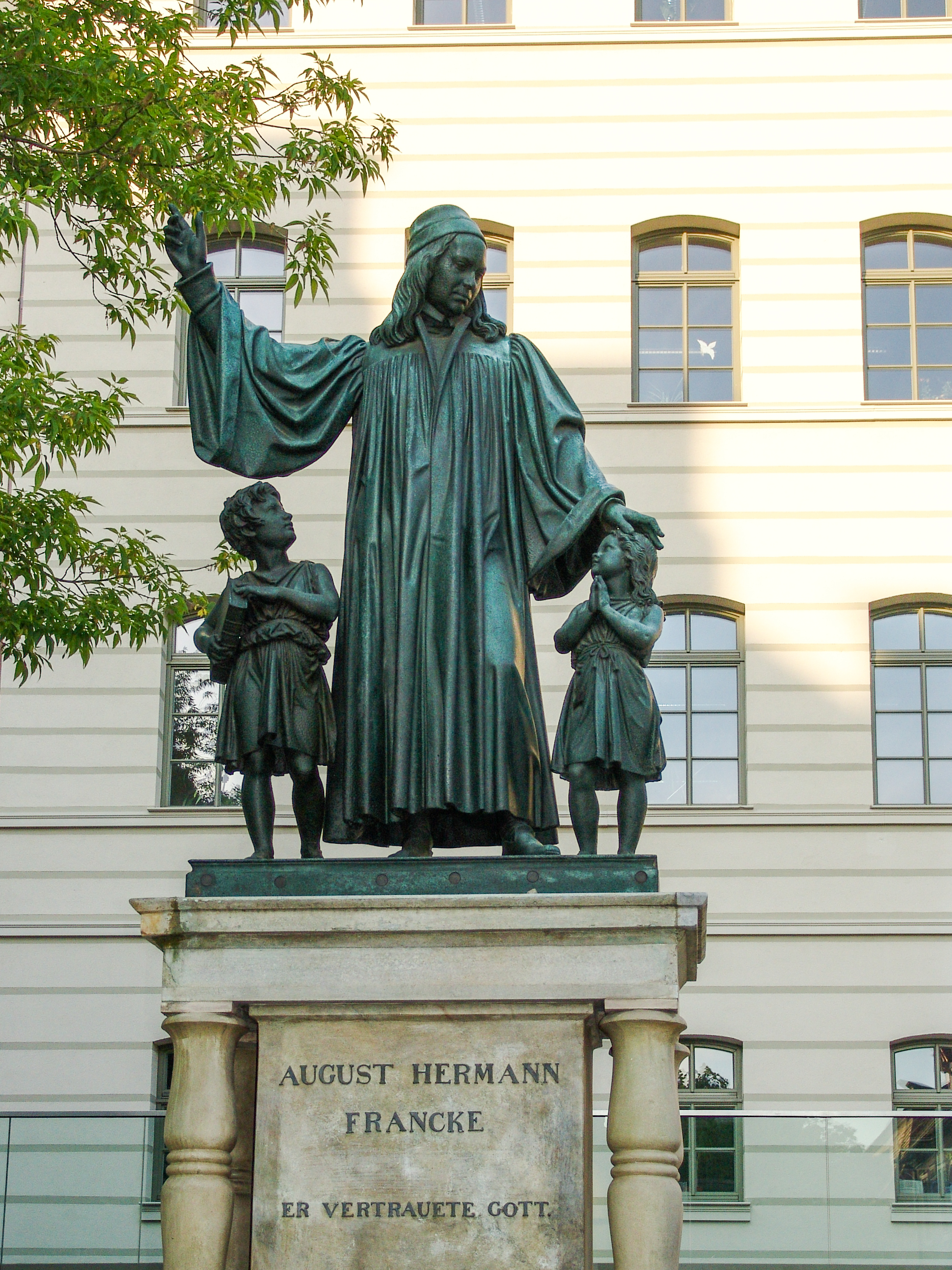 Franckesche Stiftungen in Halle